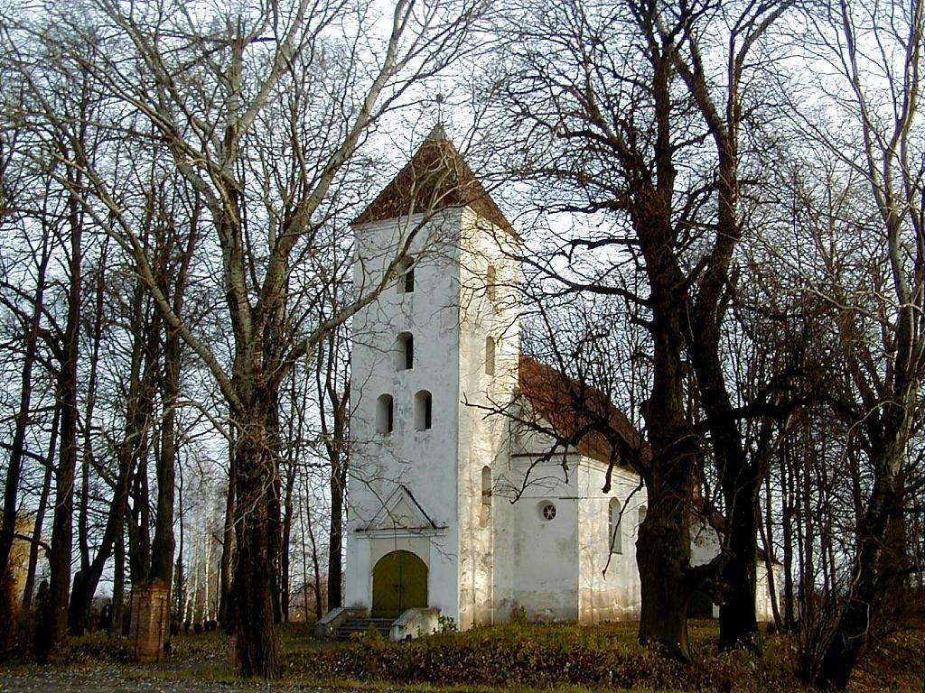 Codes baznīca 2000-11-04